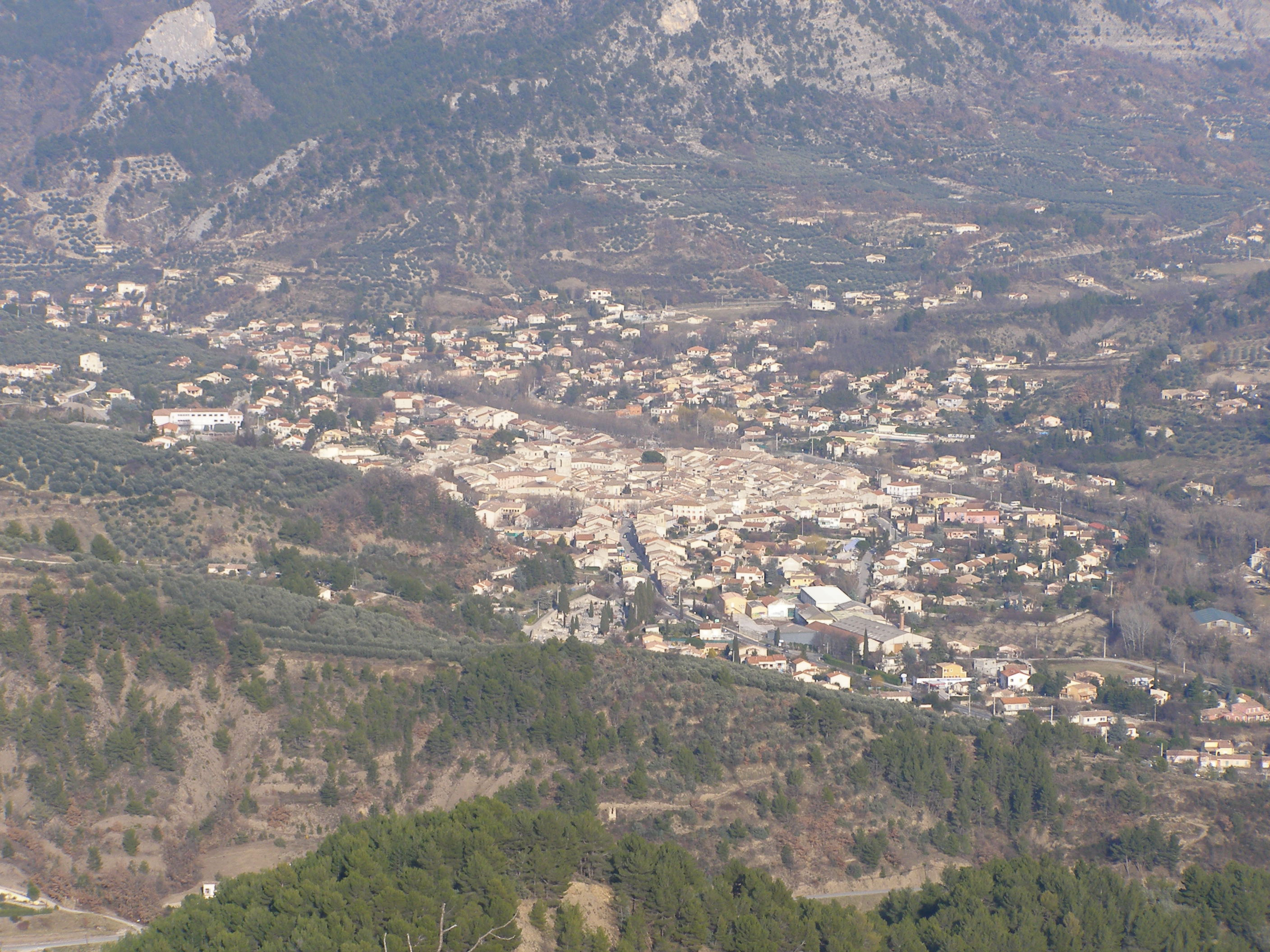 Buis-les-Baronnies (Drôme, France).